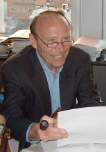 Ole Krarup, MEP kontor, Bruxelles, starten af 2000-tallet